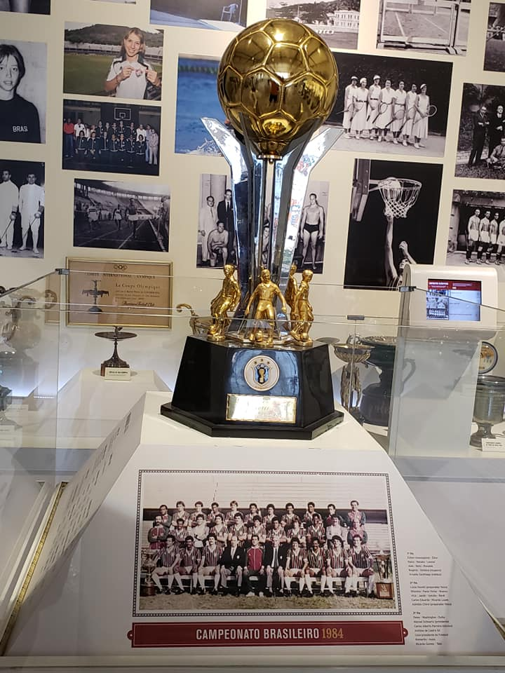 Taça do Campeonato Brasileiro de Futebol de 1984 Primeira divisão do futebol brasileiro